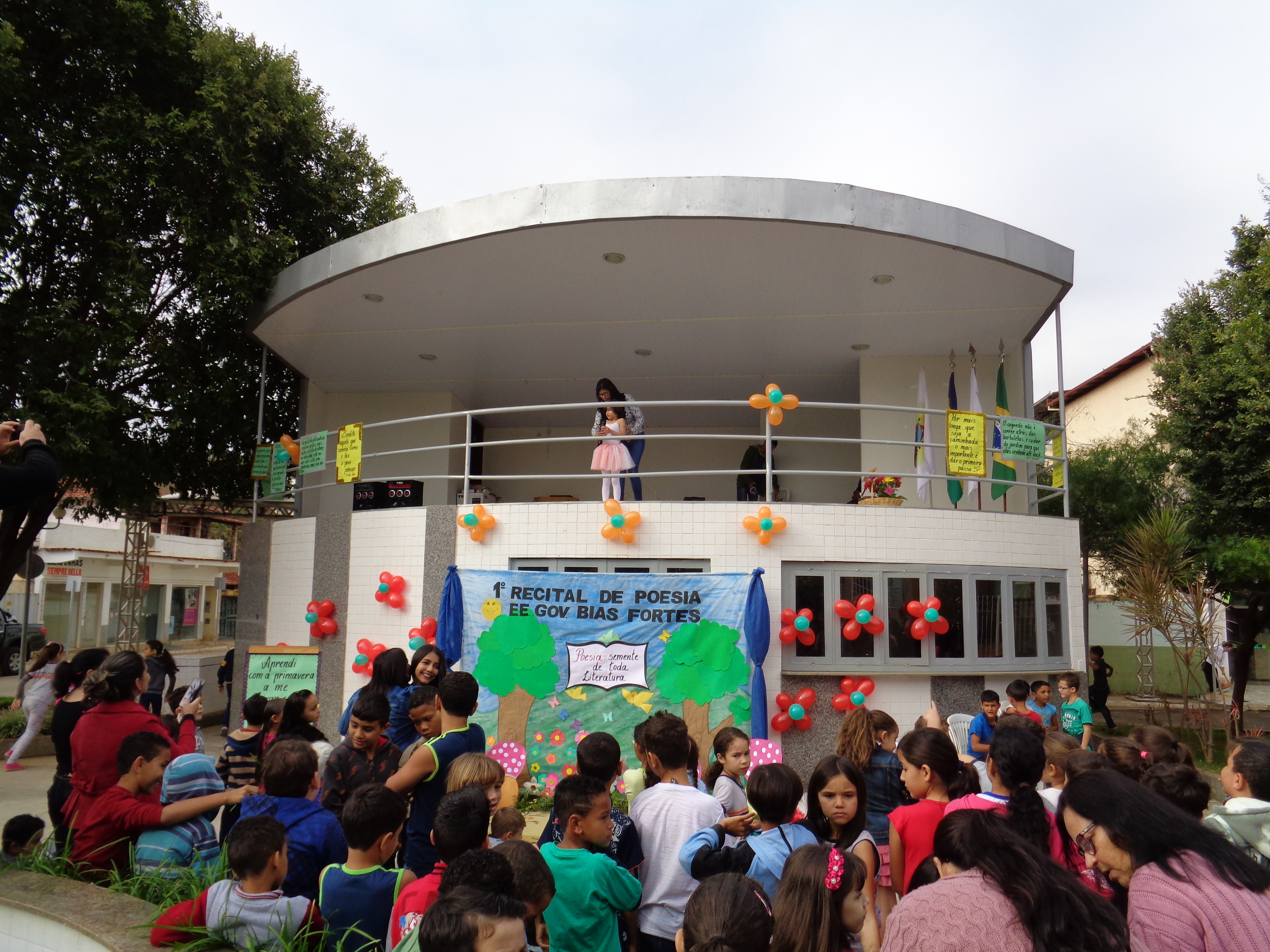 Recital de Poesia da E. E. Gov. Bias Fortes, em Alvarenga, Minas Gerais, Brasil.